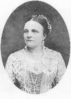 Antoinette von Sachsen-Altenburg, Ehefrau von Friedrich I.